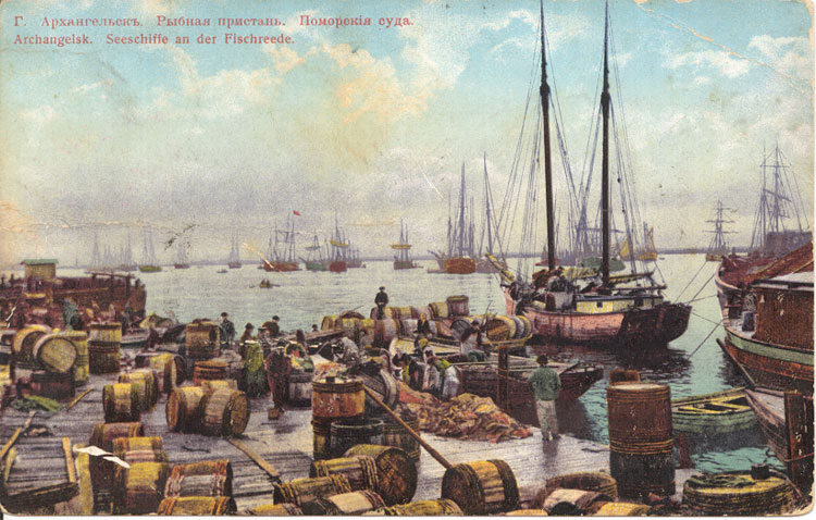 Поморие 1643 год